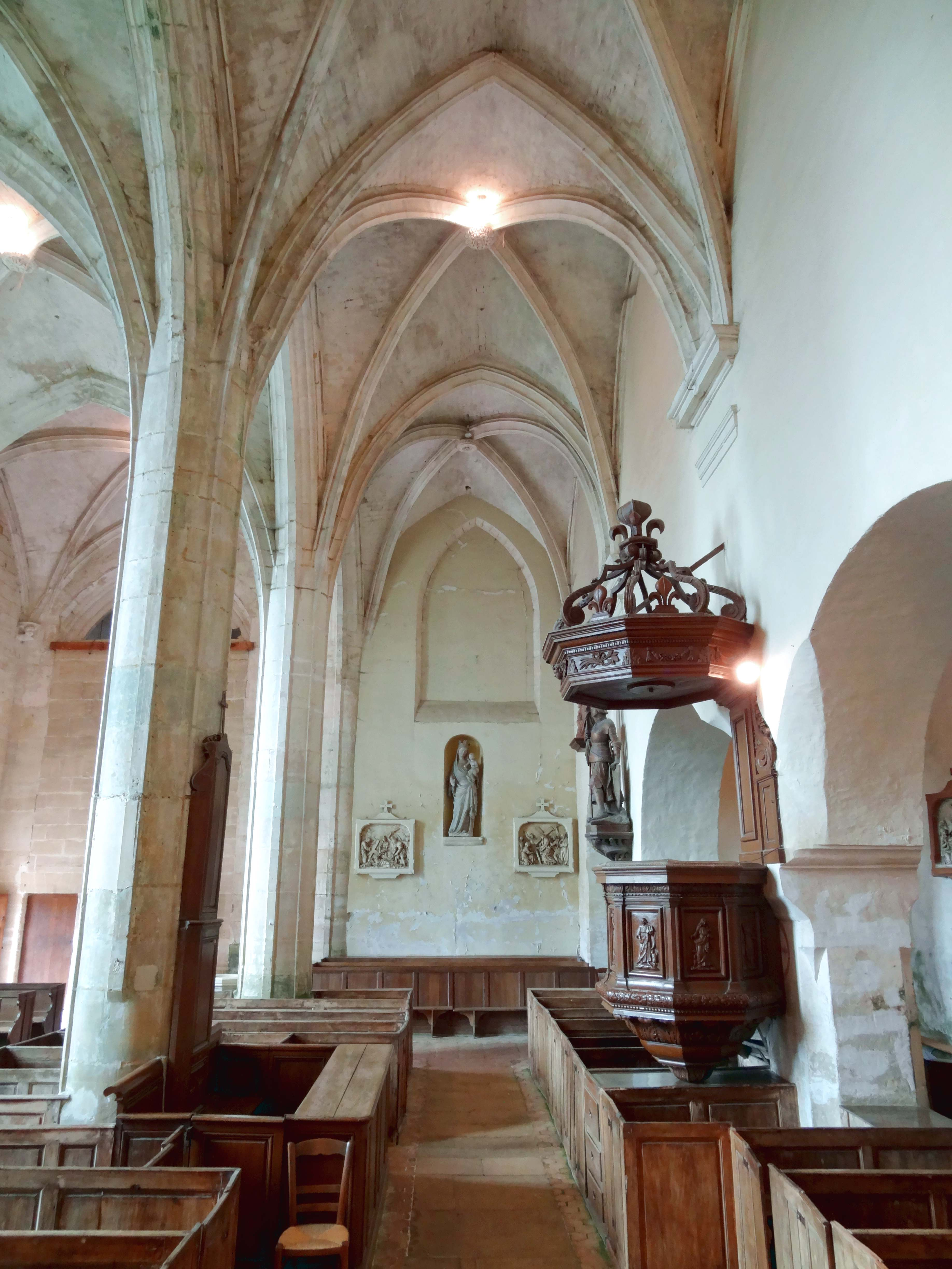 Intérieur de l'église - voir titre.